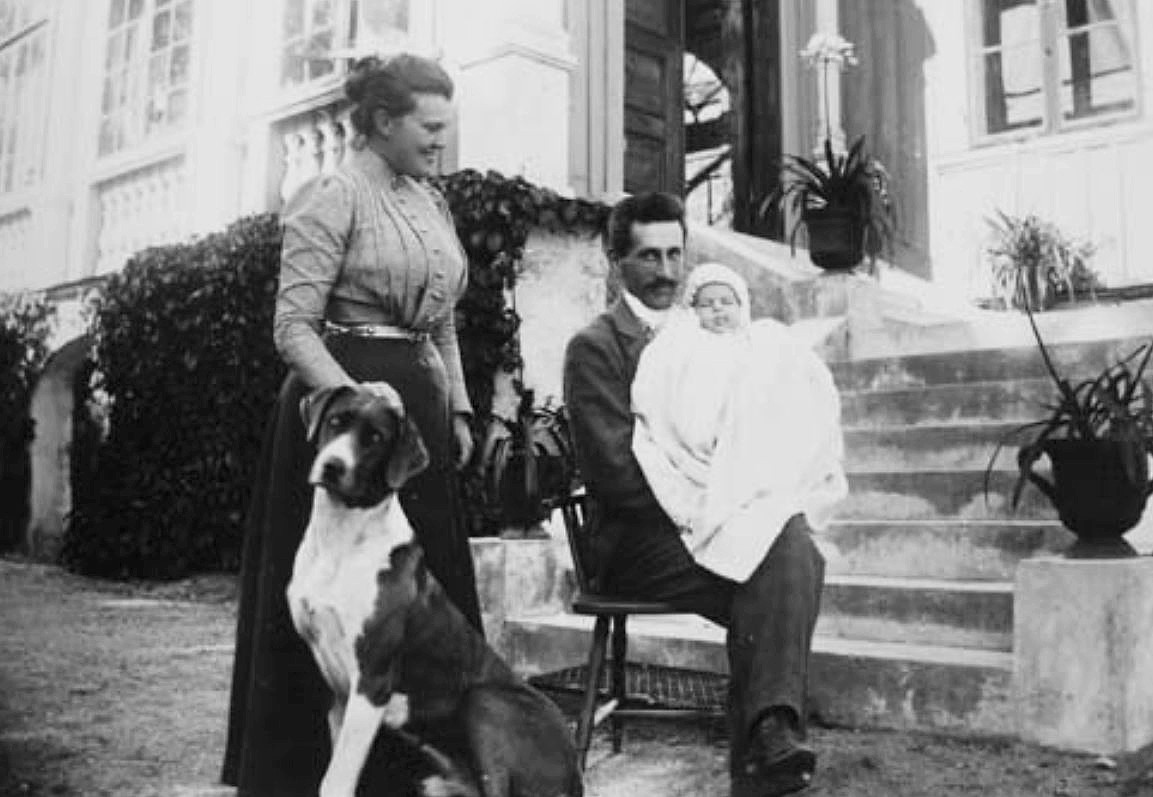 Sigrid och Johan Ihre vid Ekebyhovs herrgård